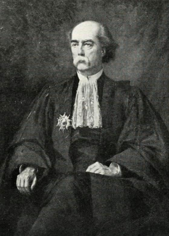 "Portrait de M. Liard, vice-recteur de l'Académie de Paris".